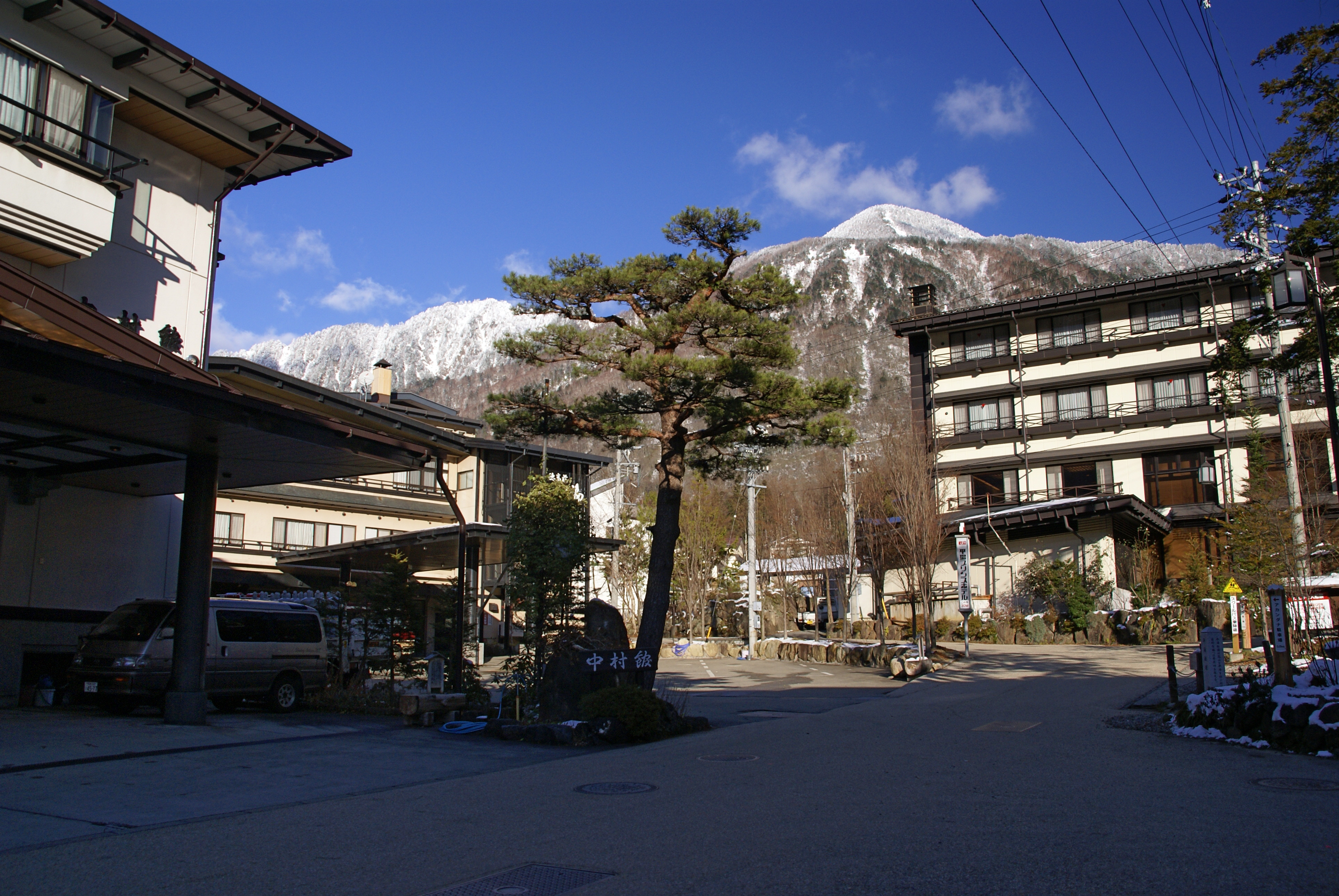 Hirayu Onsen in Takayama, Gifu prefecture, Japan